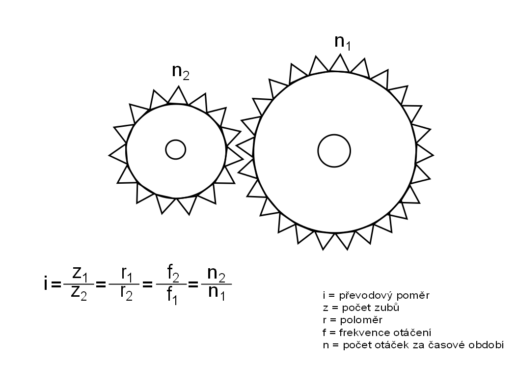 Fyzikální popis převodového poměru